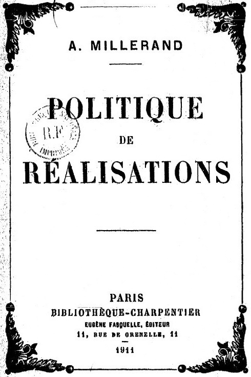 Couverture de l'ouvrage d'Alexandre Millerand Politique de réalisations (Paris, Éditions Fasquelle, 1911, 407 pages).